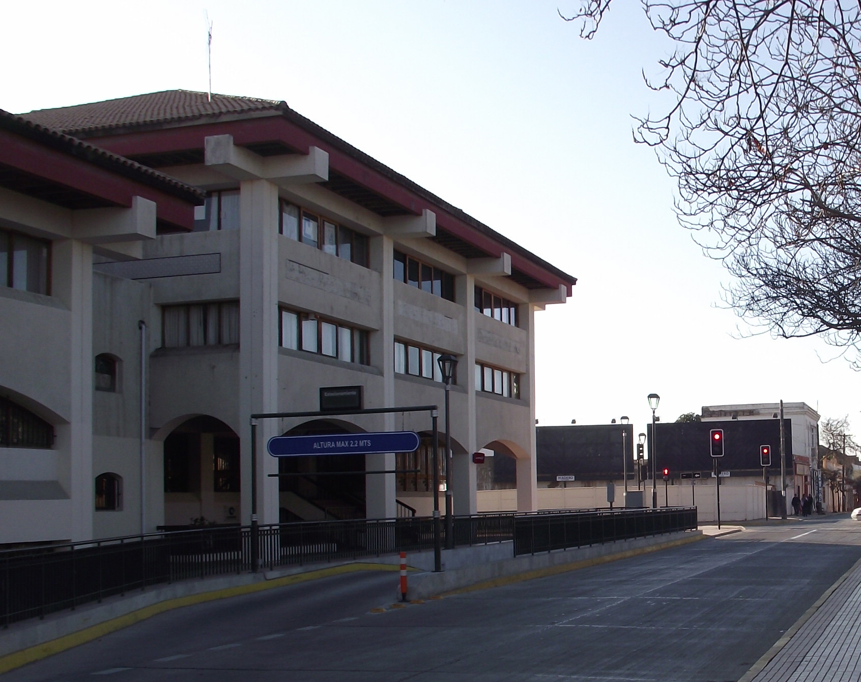 Edificio de los Servicios Públicos de La Serena.